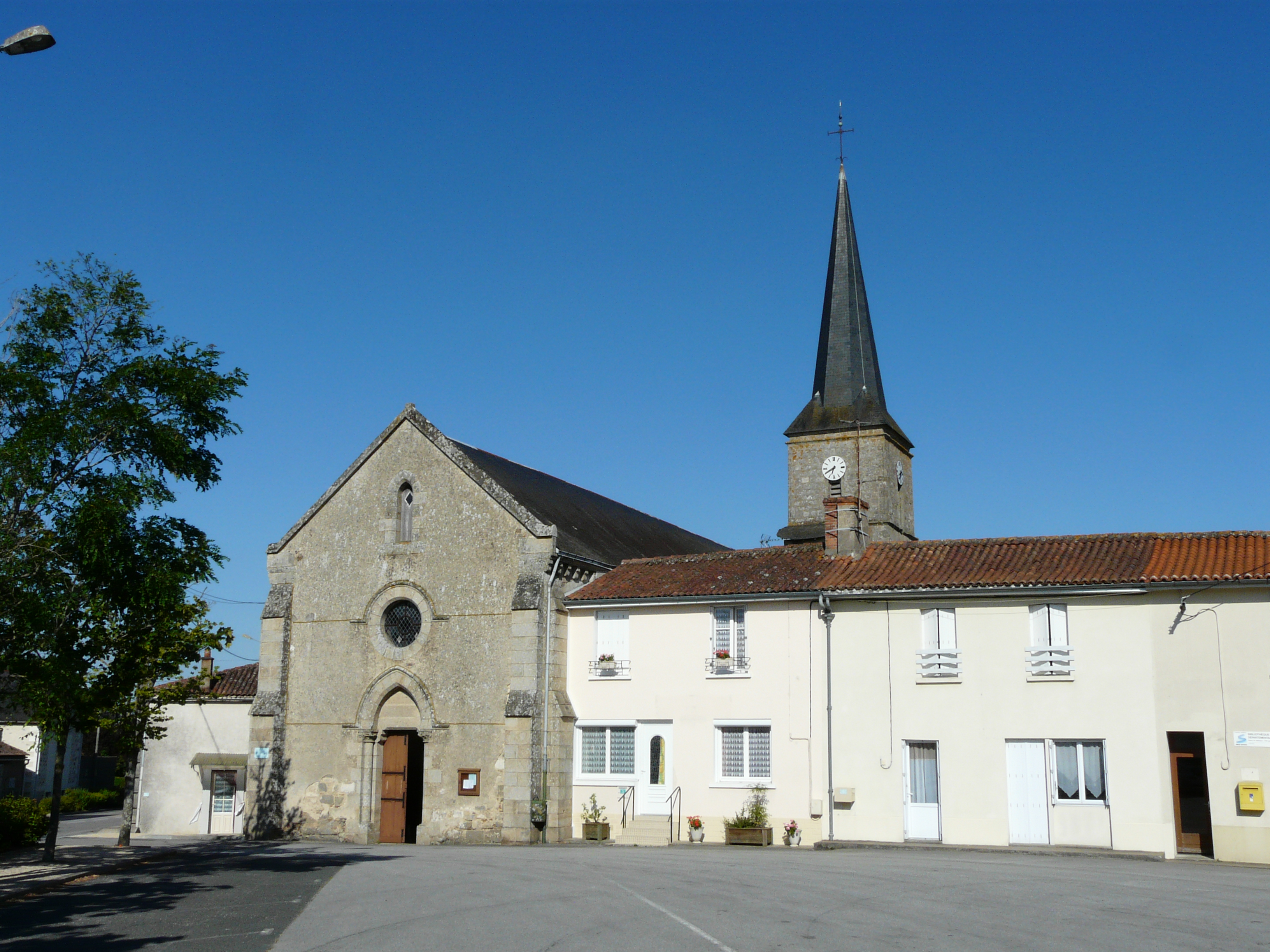 L'église Saint-Hilaire de Boussais, Deux-Sèvres, France.